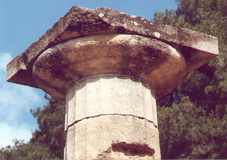 Dorisches Kapitell vom Heraion in Olympia. Dorisches Kapitell vom Heratempel (Ostseite, 4. Säule von Süd). Echinus. Limburgs: Dorische orde in Hera-tempel.